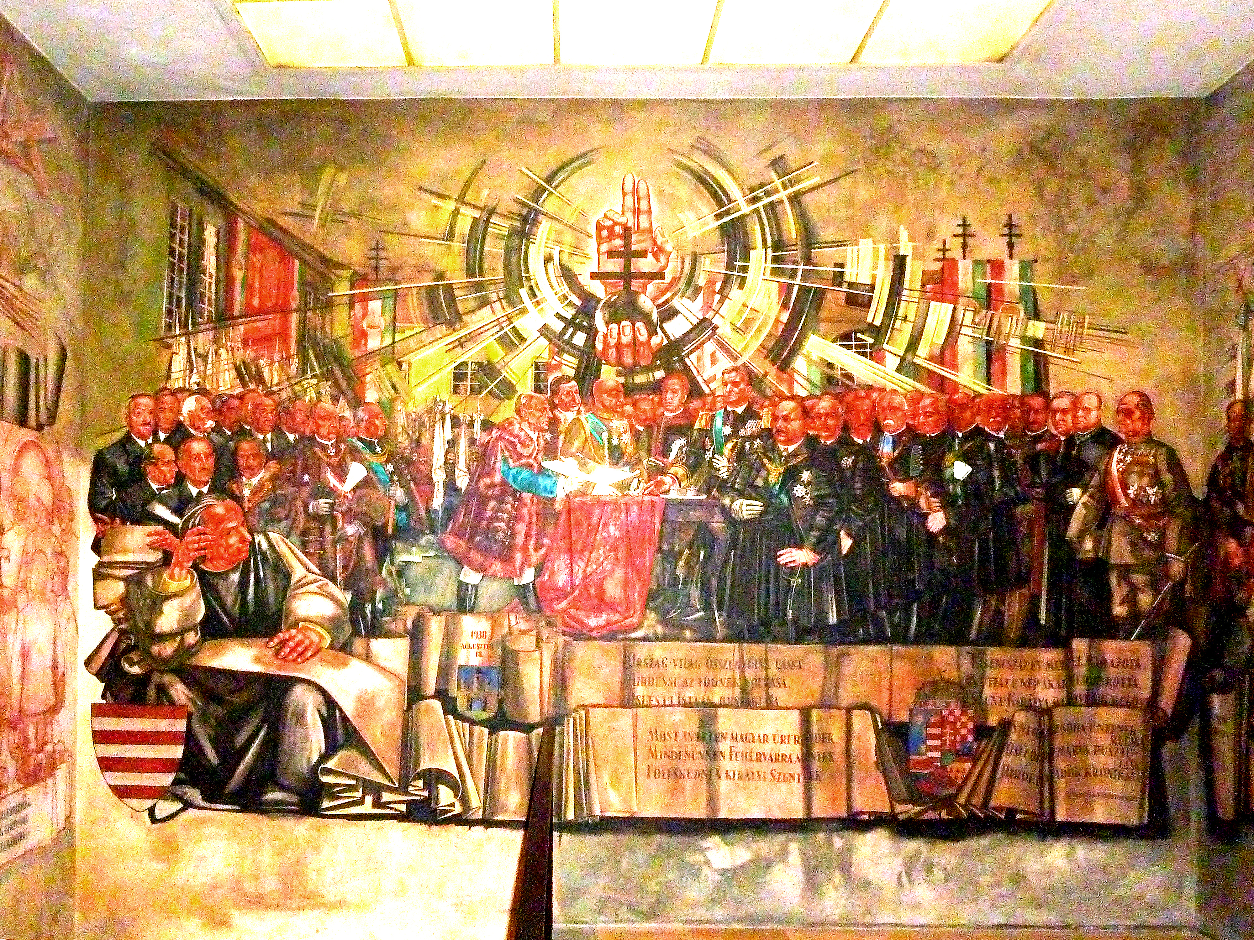 Az Országgyűlés 1938. augusztus 18-án – Szent István halálának 900. évfordulóján – Székesfehérváron meghozott törvénnyel (1938. évi XXIV. törvény) emelte állami ünnep rangjára Szent István ünnepét. Az alkotás az ünnepi év eseményeit mutatja be.